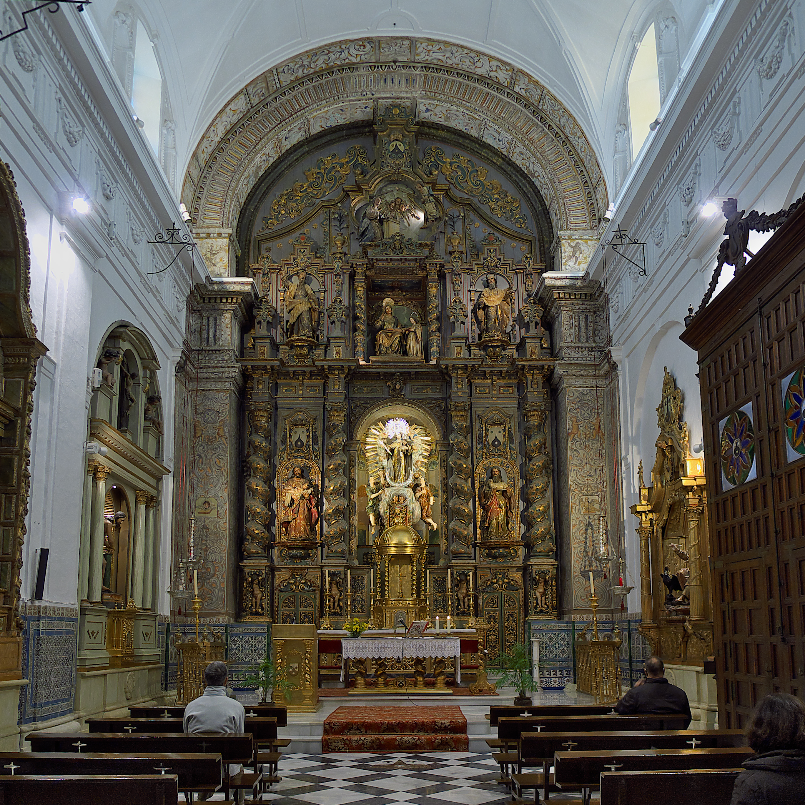 Iglesia del convento de las carmelitas (s. XVII). Autoría del escultor Fernando de Barahona (1675) y procedente del desaparecido convento de la Encarnación de Belén (Sevilla), dorado por Miguel Parrilla (1692). Importante el grupo escultórico de Santa Ana y la Virgen, de Juan Martínez Montañés (1627).